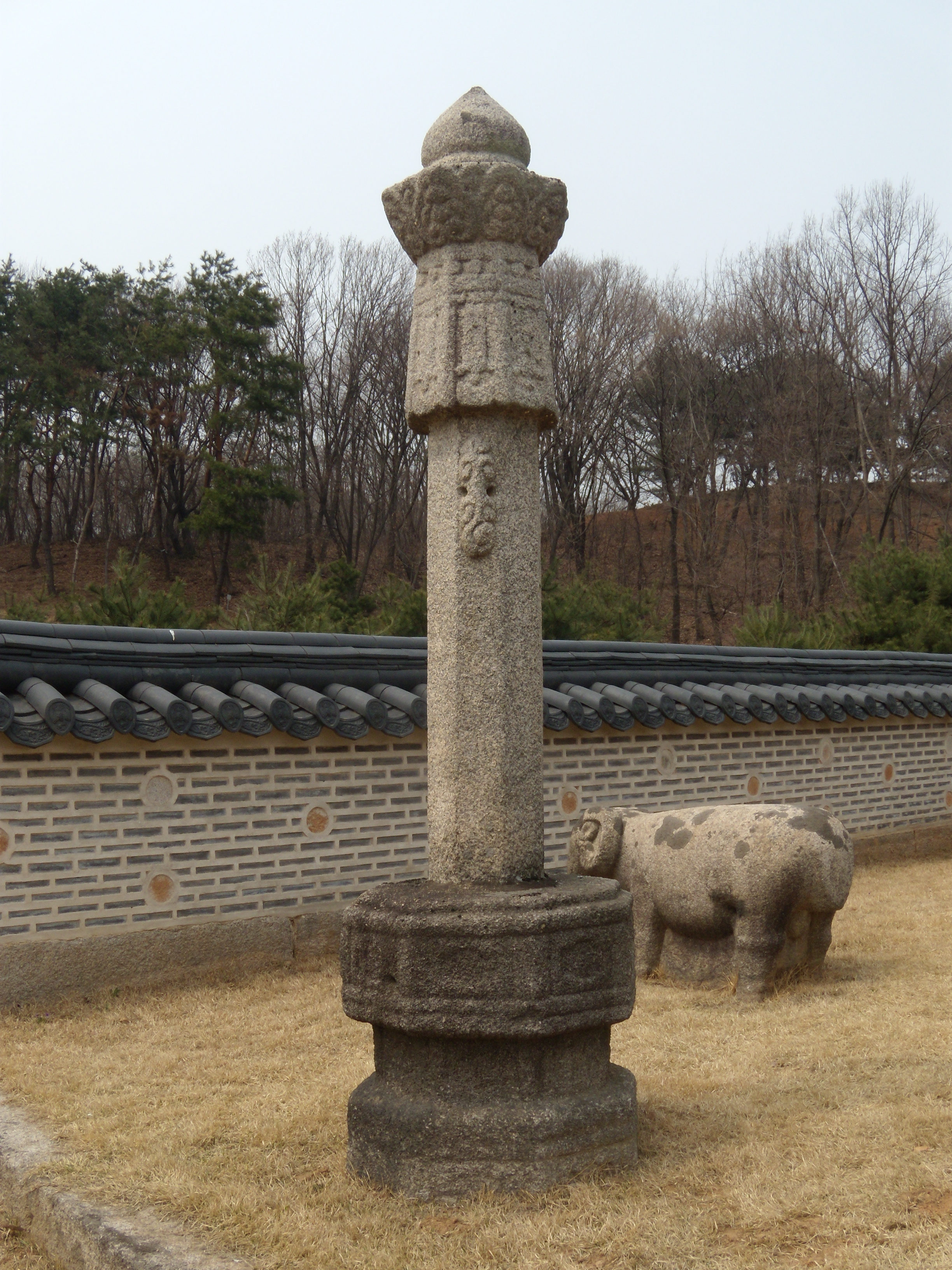 목릉 의인왕후릉의 망주석